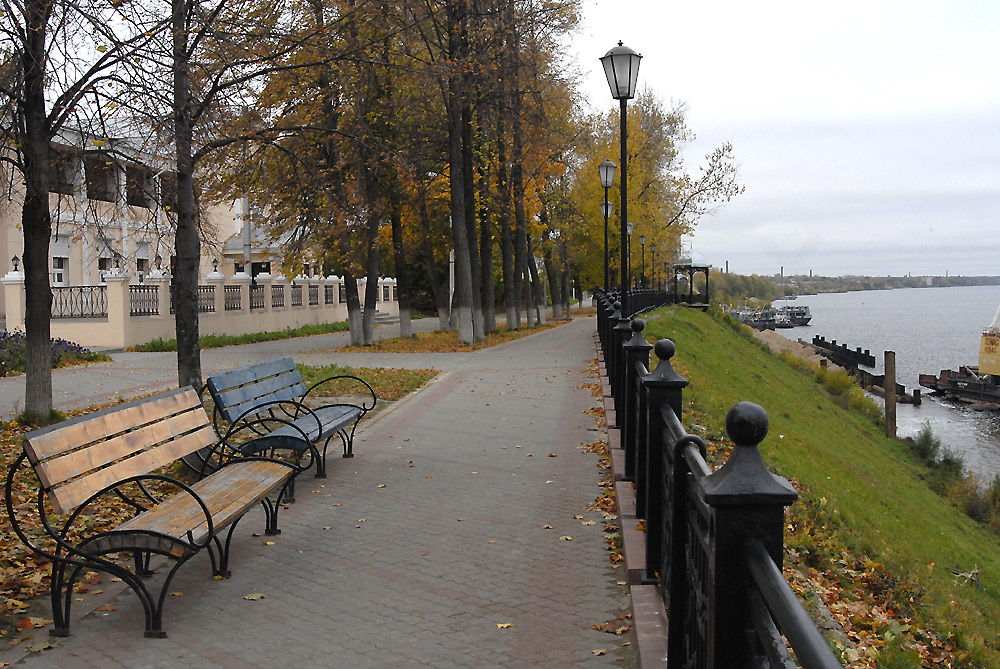 Wolga-Ufer in Kineschma, linke Seite 2006